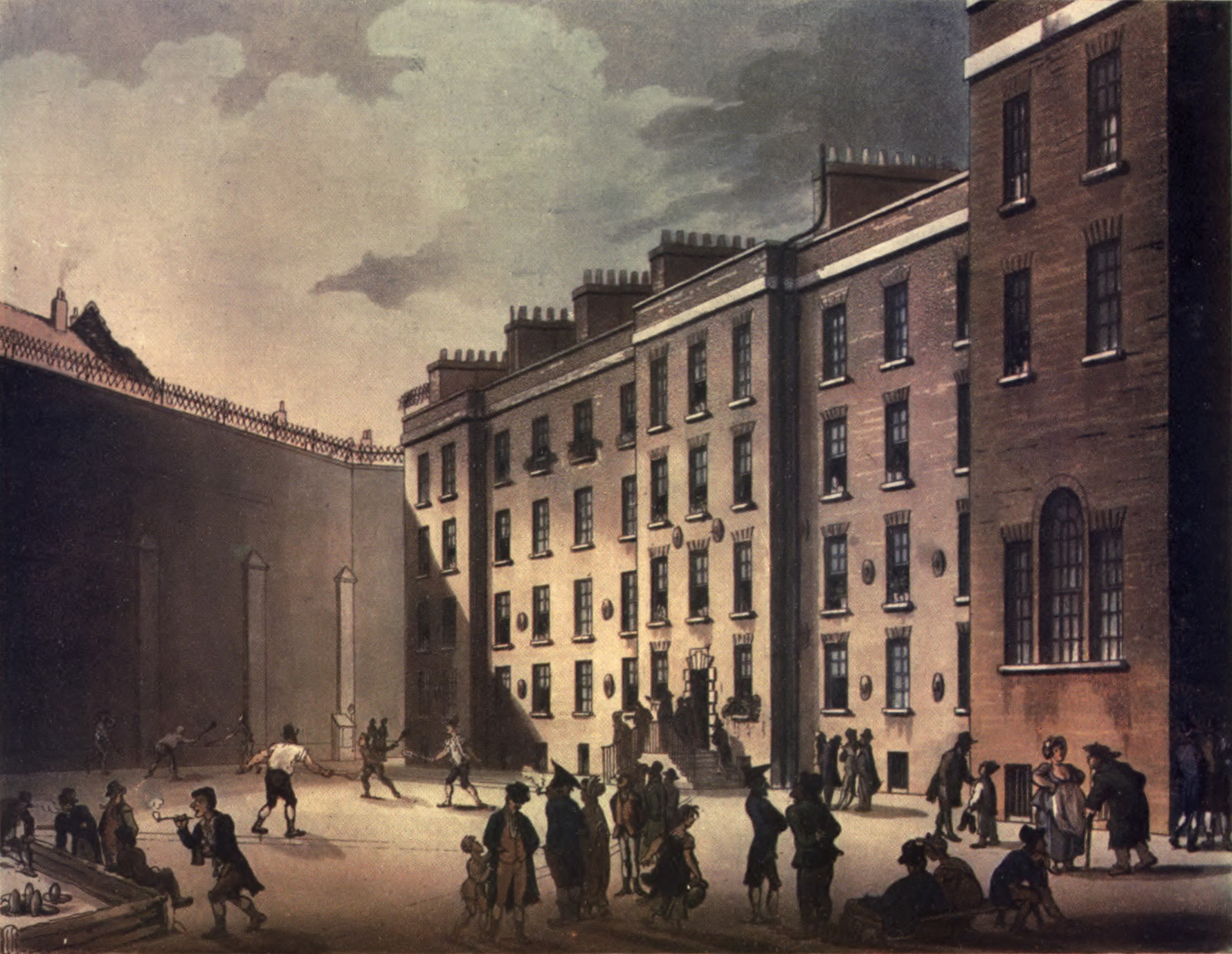 Fleet Prison